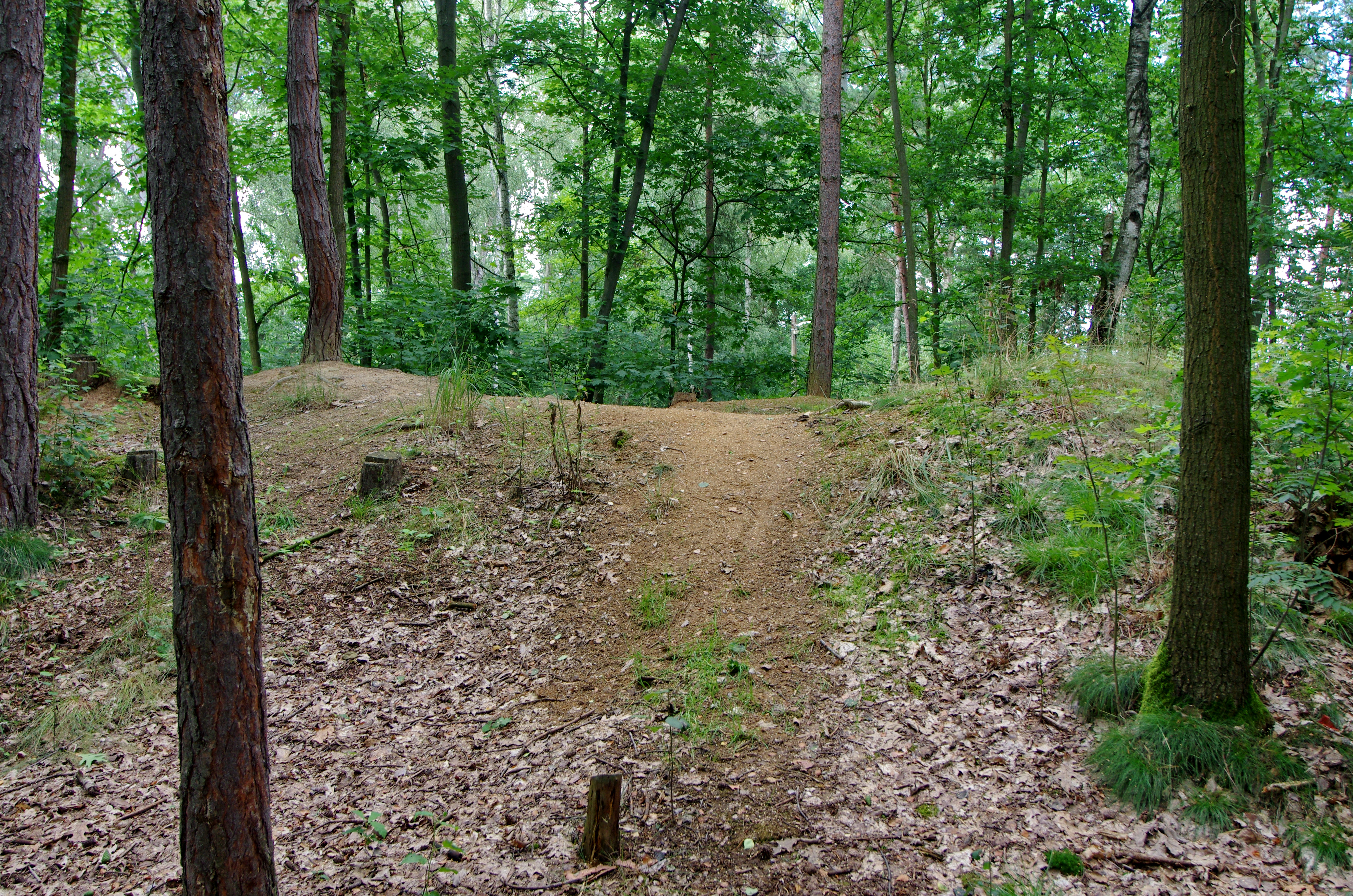 Tašovice, místní část Karlových Varů, archeologická rezervace